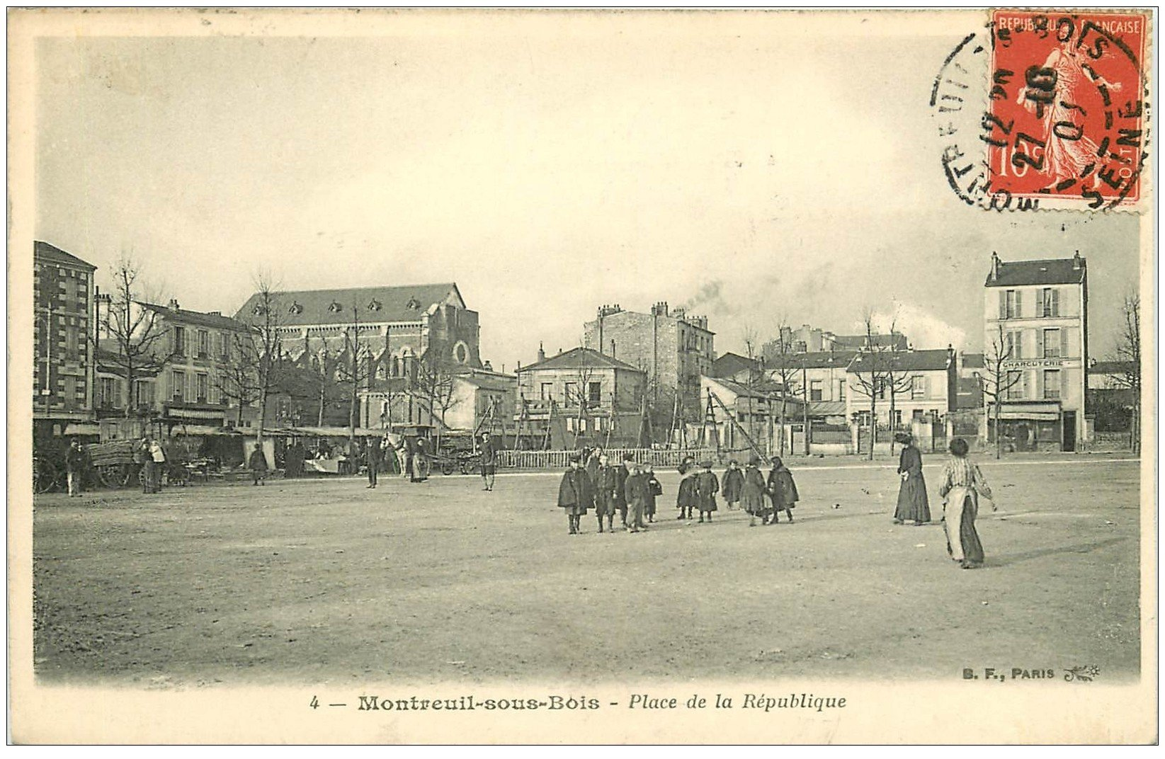 Montreuil-sous-Bois en 1908: La place de la République